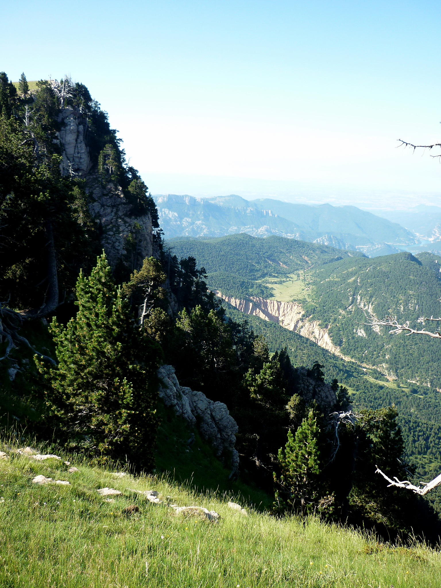 La vessant de ponent de Pujalt es despenja sobre la capçalera del Mosoll. Es distingeixen Pratformiu i les Terreres